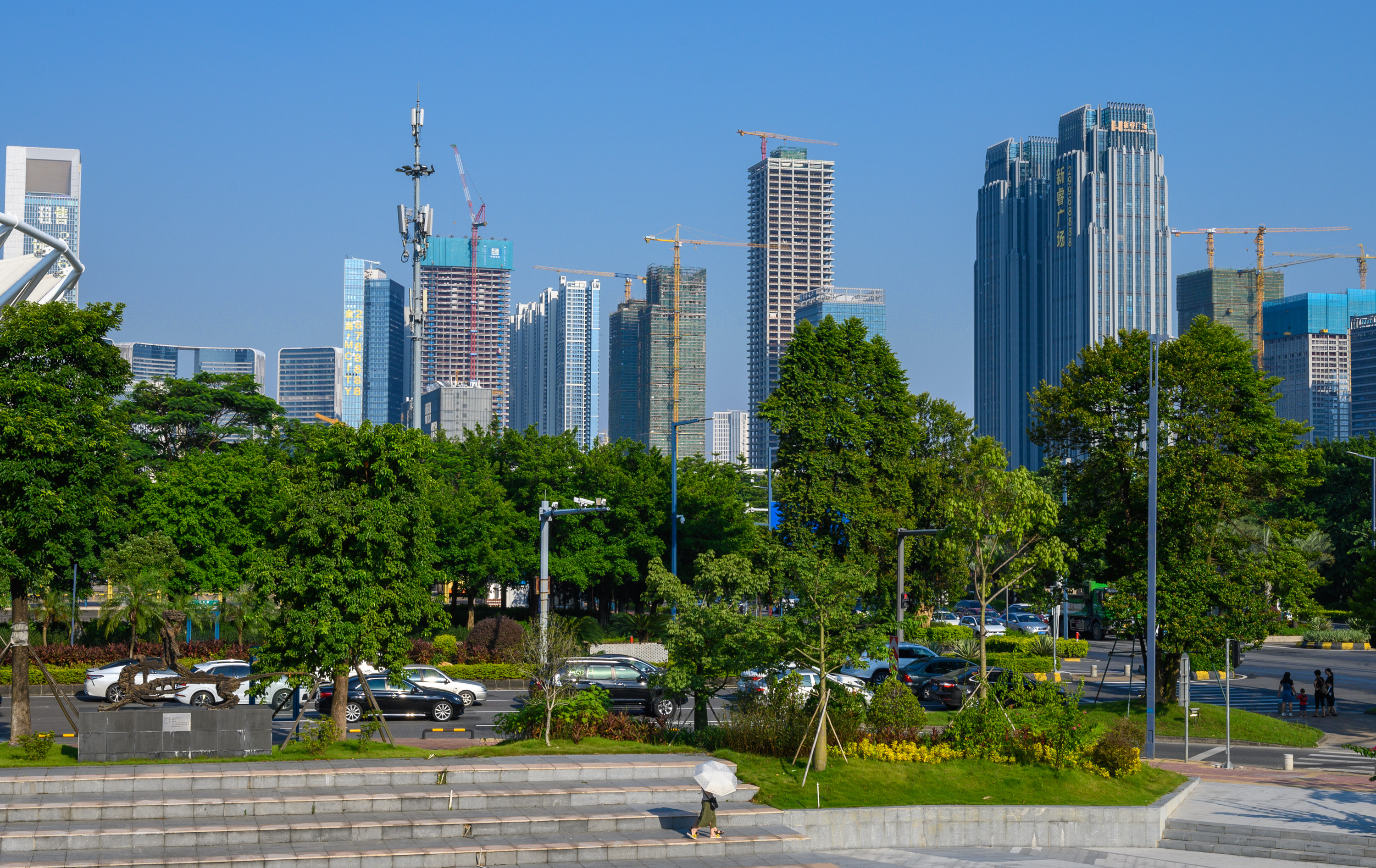 39459-Foshan